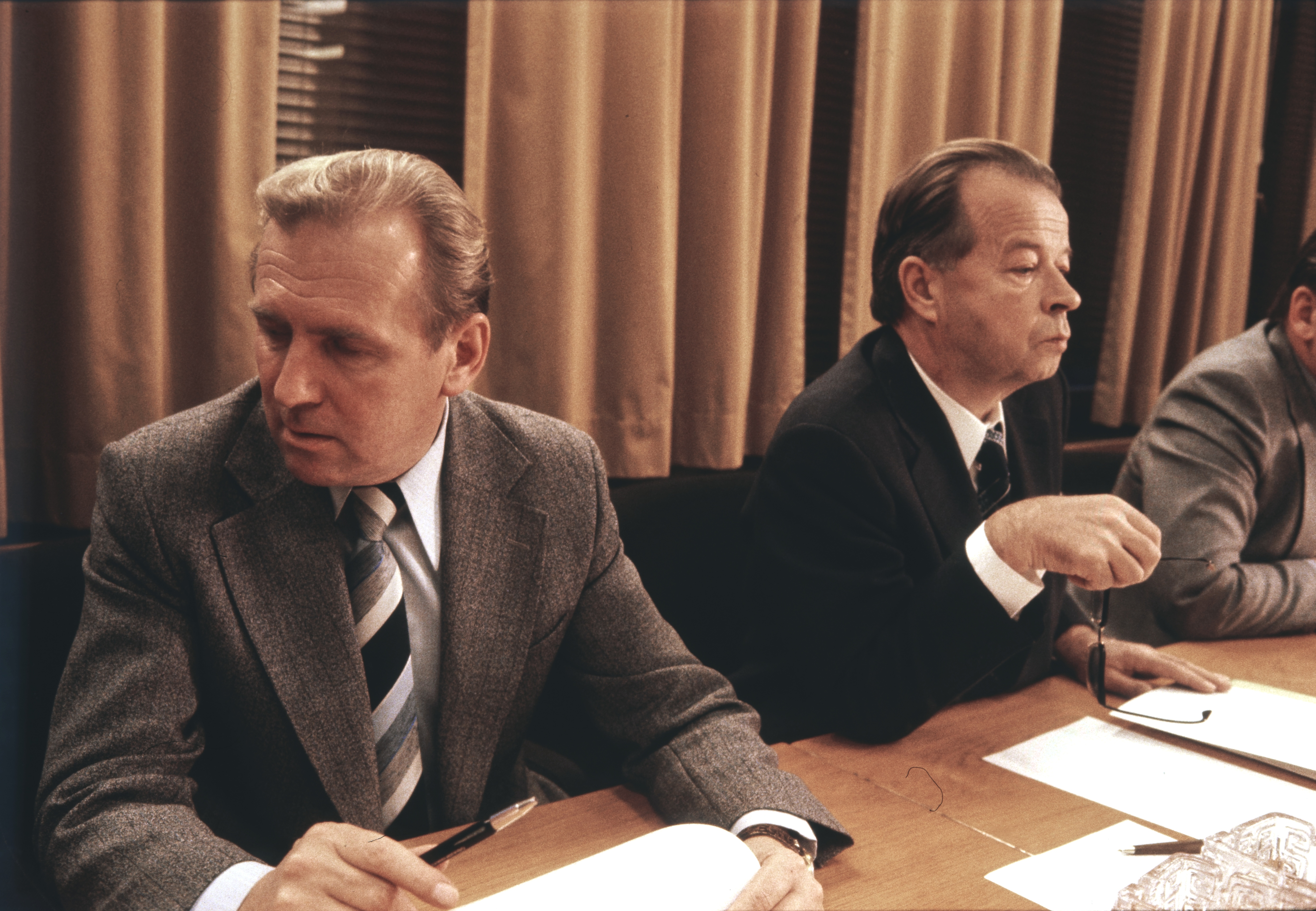 TES-neuvottelut vuonna 1978, vasemmalla SAK:n varapuheenjohtaja Olavi Hänninen (1929–1989) ja SAK:n puheenjohtaja Pekka Oivio (1918–2000).